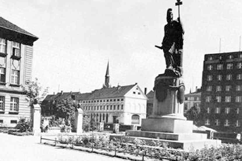 Borussia-Denkmal, 1907 enthüllt, 1923 zerstört, in Memel (Klaipėda, Lithuania)